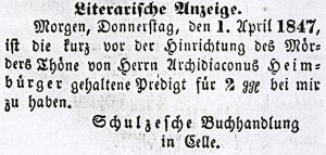 Literarische Anzeige: Heimbürger, H. C., Das blutige Hochgericht eine laut redende Warnungstafel für Jedermann. Eine Predigt am 19. März 1847 kurz vor der Hinrichtung des Mörders S. C. H. D. Thöne gehalten. Celle, Schulze, 8. 3 3/4 Ngr. Blätter für literarische Unterhaltung, 1847, S. 544